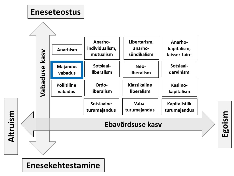 Majandusvabaduse positsioon sotsiaalse korra mudelis